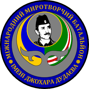 Нарукавний знак Міжнародного миротворчого батальйону імені Джохара Дудаєва